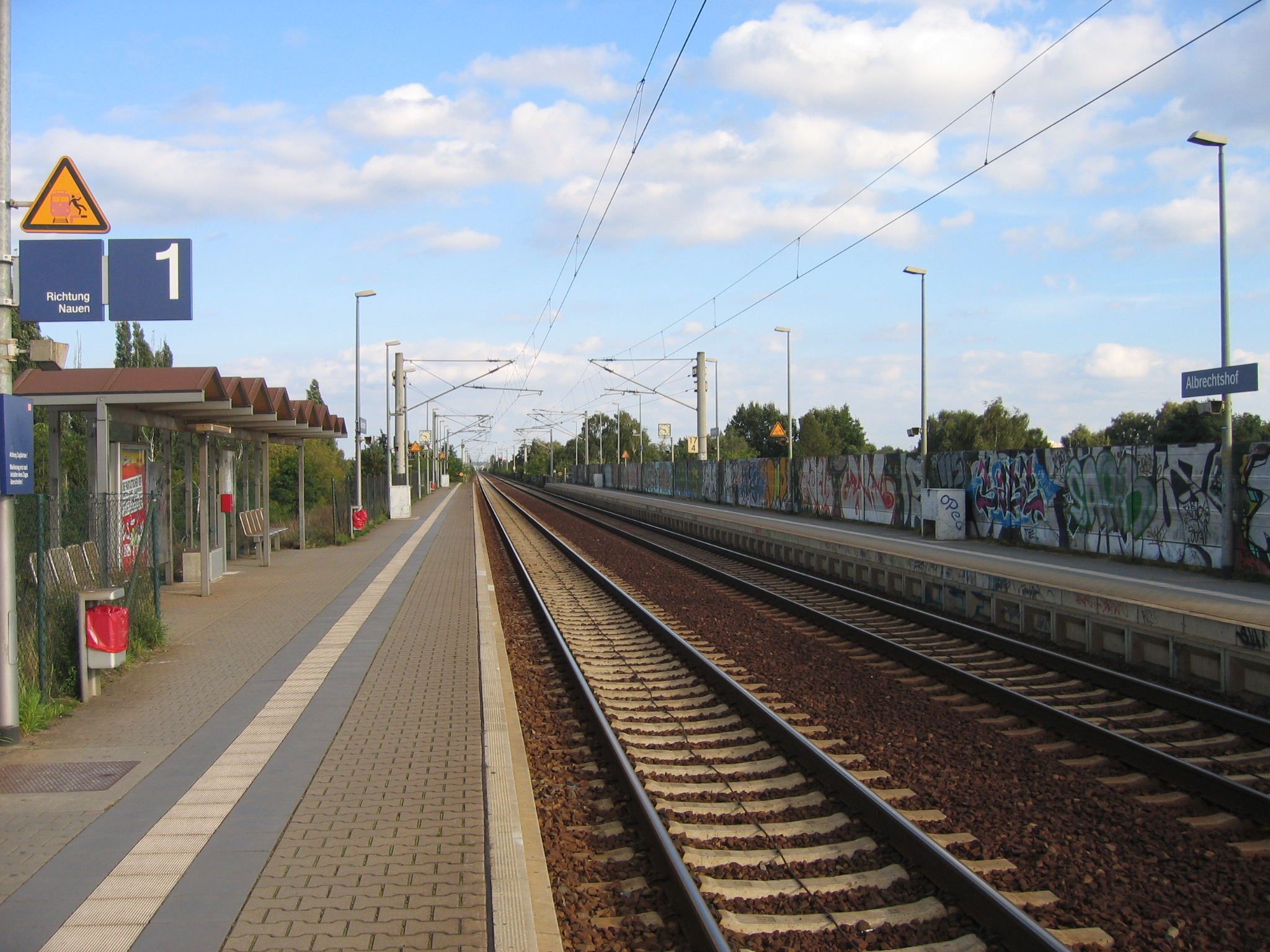 Bahnhof Berlin-Albrechtshof